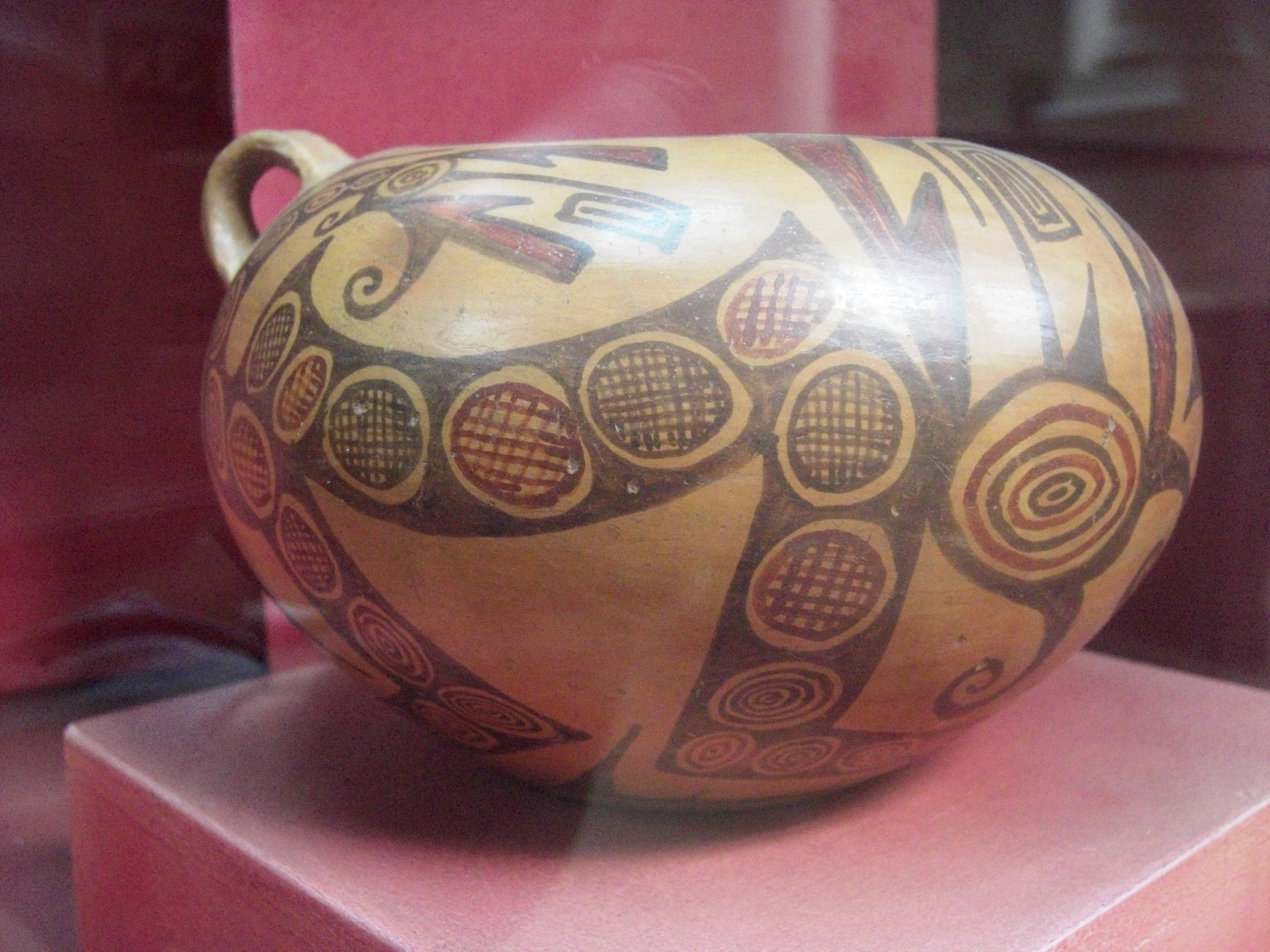 Detalle de la vitrina dedicada a la cultura La Aguada .Museo de la Plata. Argentina